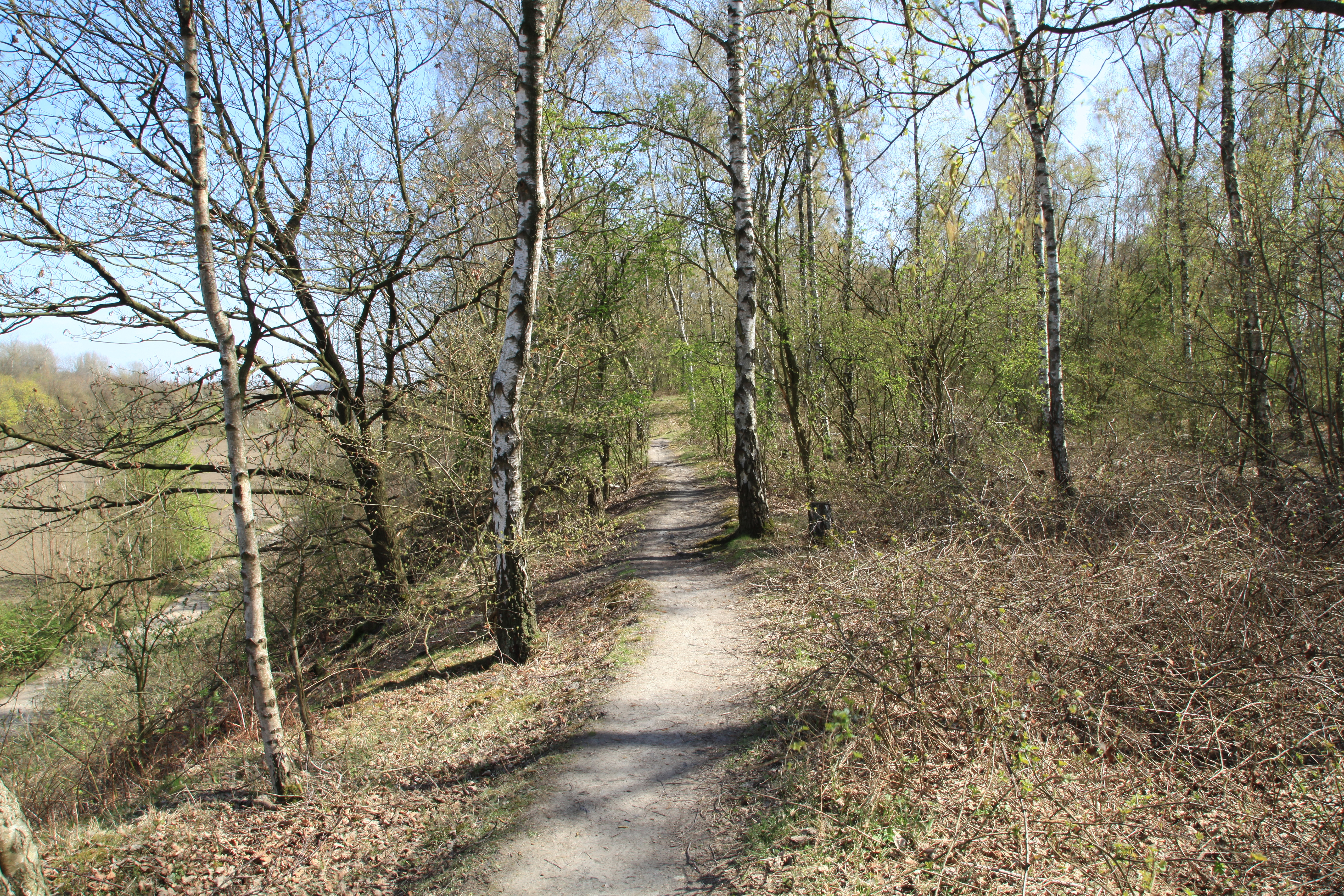 Halde Rheinbaben in Gladbeck an der Industriestraße in Bottrop